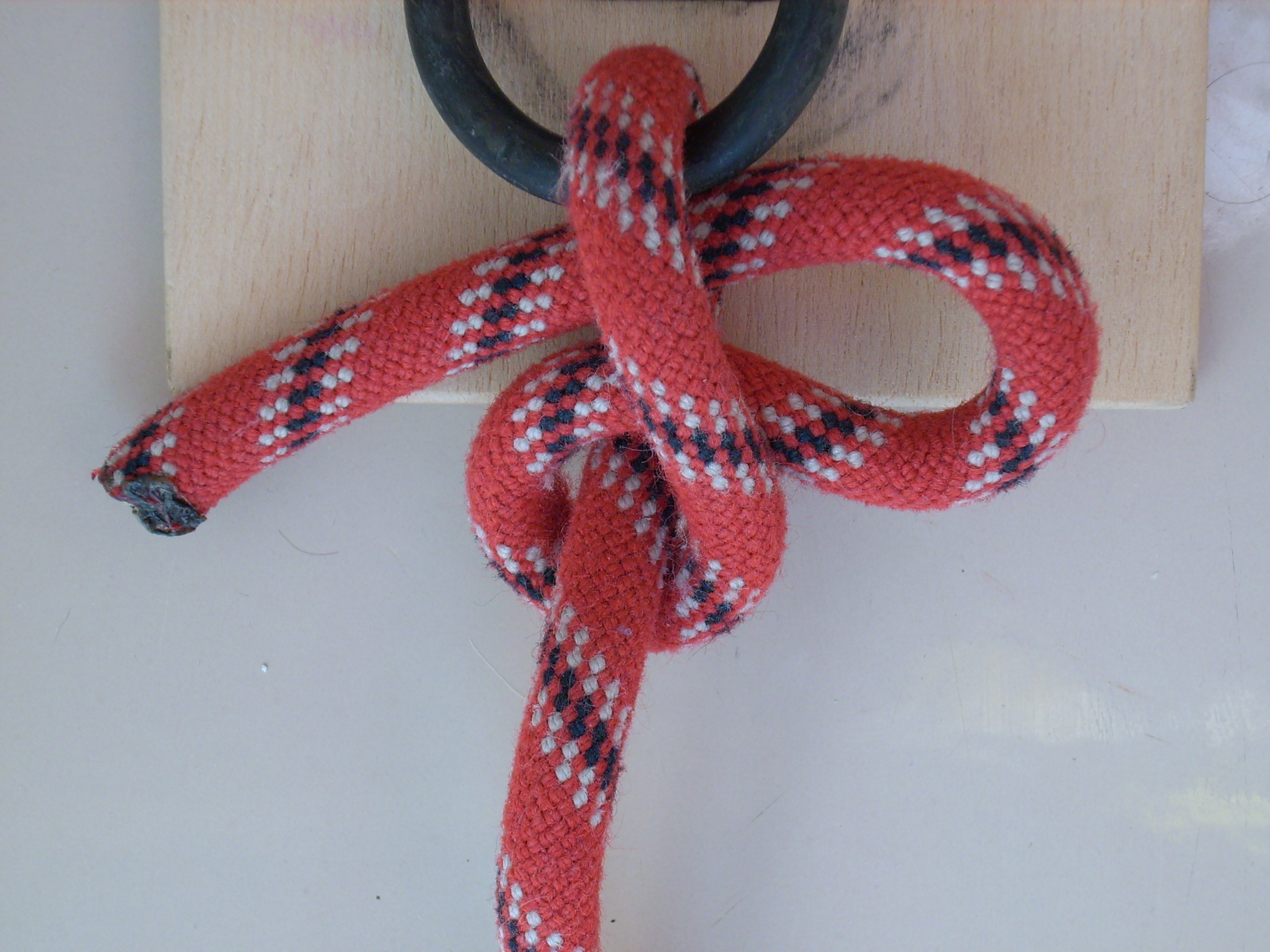 Slipstek